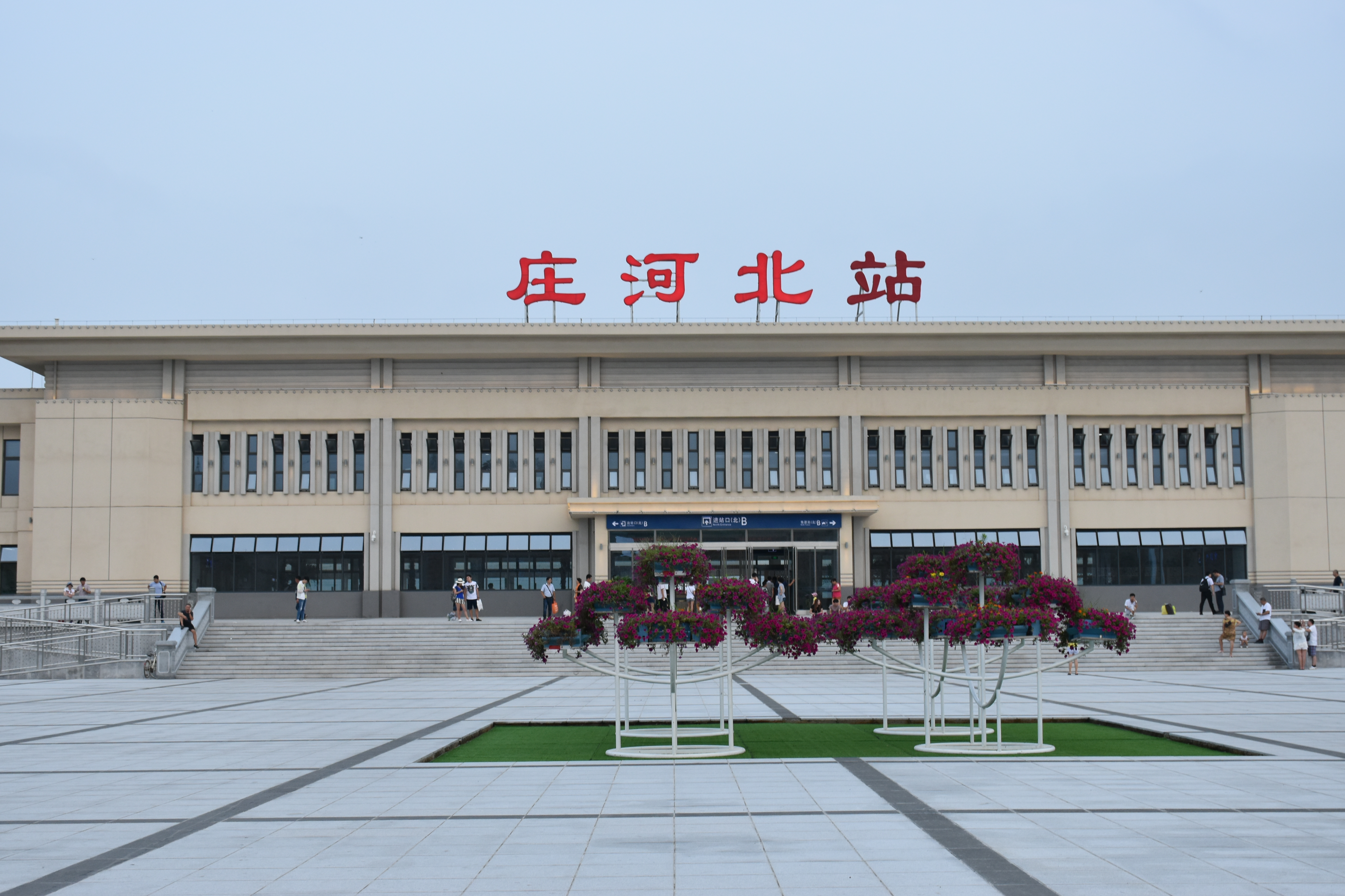 庄河北站北广场。